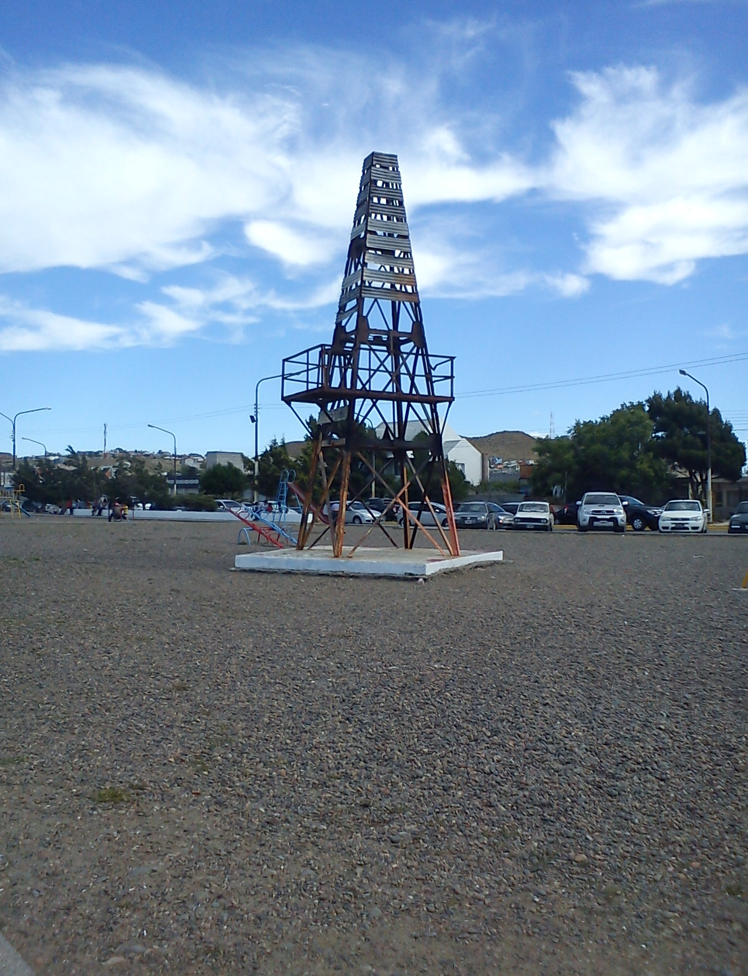 Torre de petroleo en la costanera